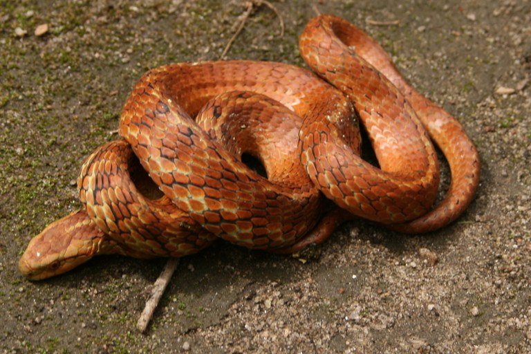 Tomodon dorsatus